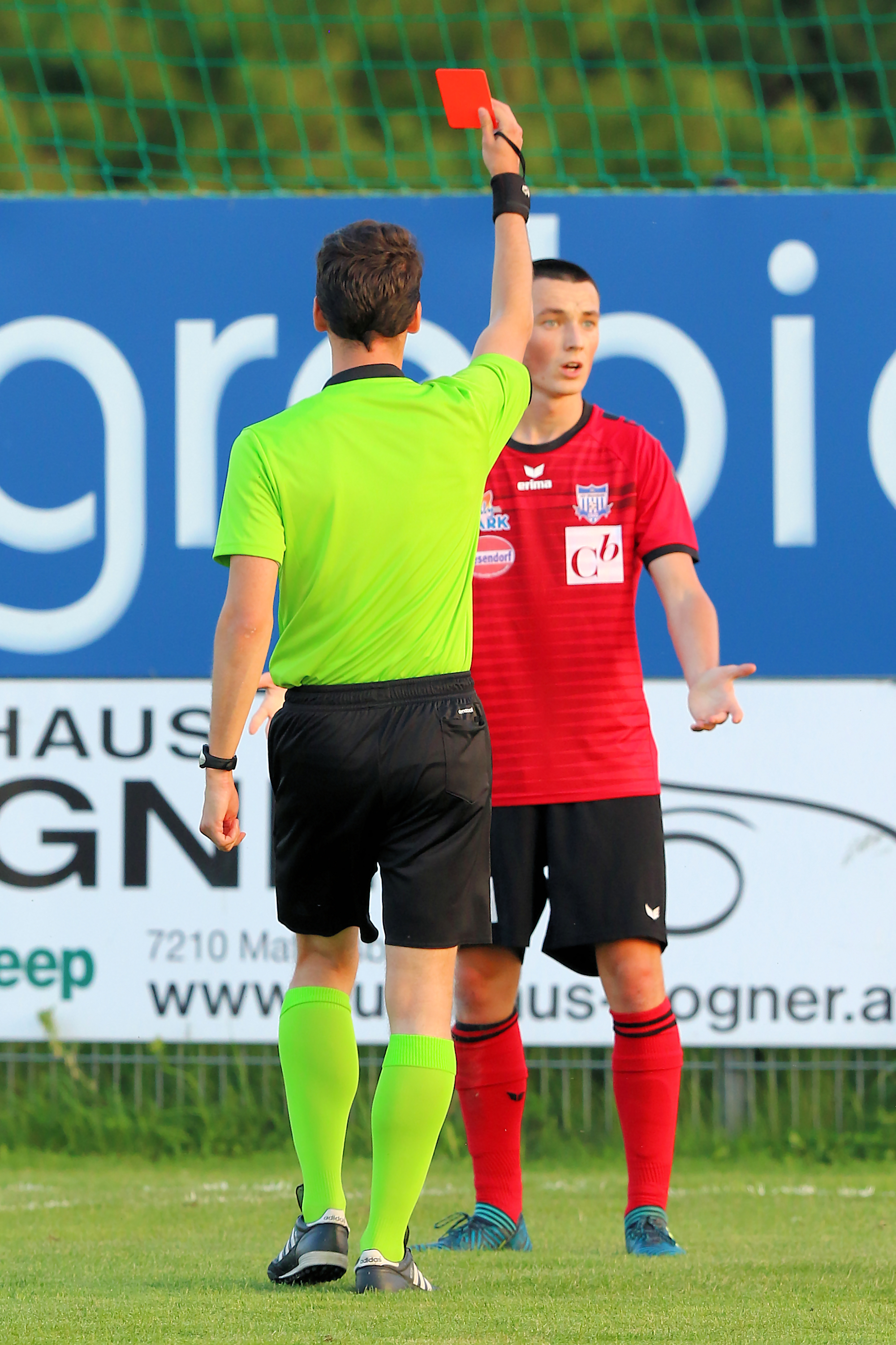 Meisterschaftsspiel der Landesliga Burgenland 2018/19 ASV Draßburg (rote Trikots) vs. SC Ritzing (schwarze Trikots) 2:3 (0:3) am 1. Juni 2019 in Draßburg. – Das Bild zeigt Schiedsrichter Herbert Mimra zeigt Dominik Kovács die rote Karte.